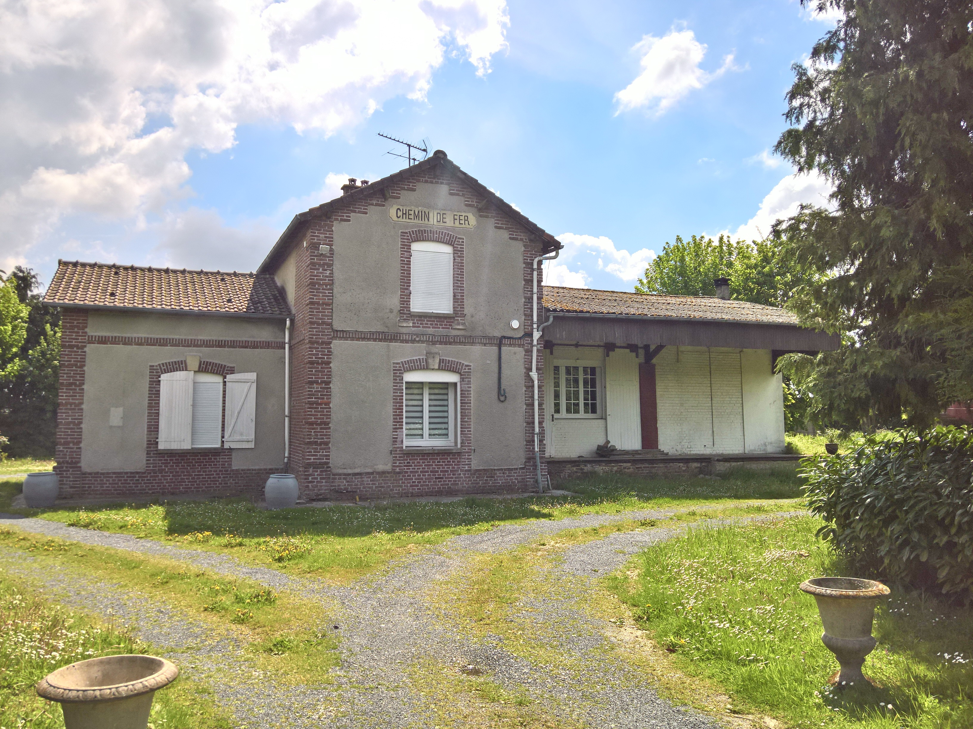 Beaucamps-le-Vieux : L'ancienne gare sur la ligne d'Amiens - Aumale - Envermeu (Chemins de fer départementaux de la Somme)